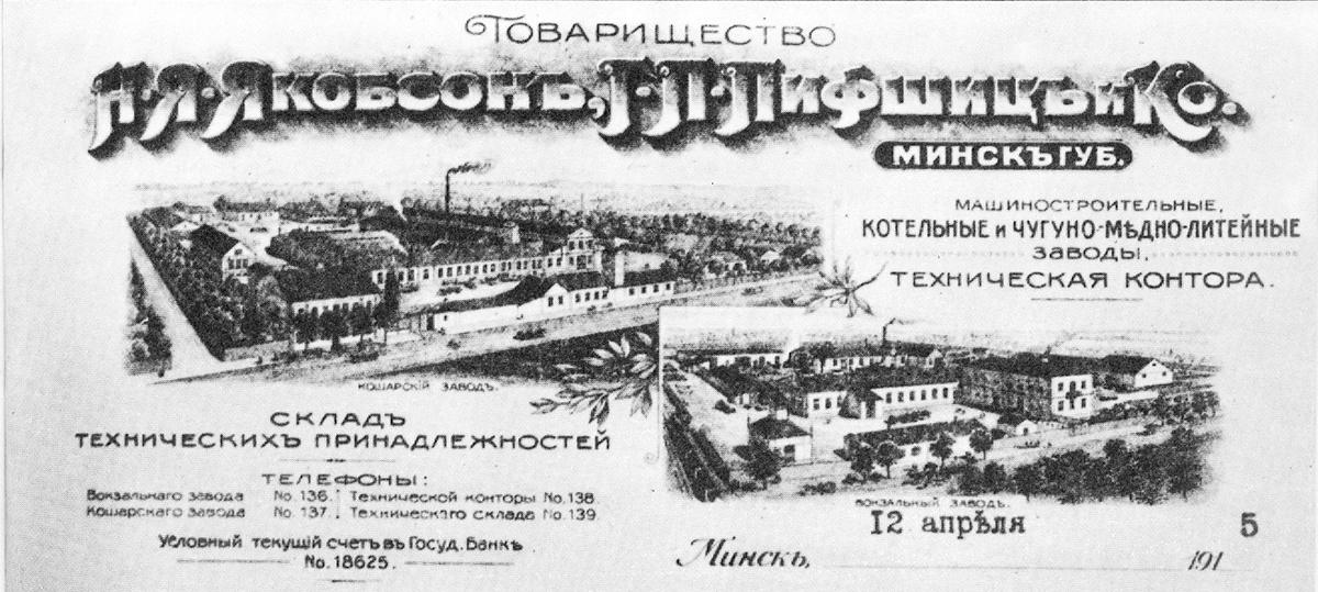 Беларуская (тарашкевіца): Менск (Miensk), заводы ў Кашарах (Kašary) і Добрых Мысьлях (Dobryja Myśli)